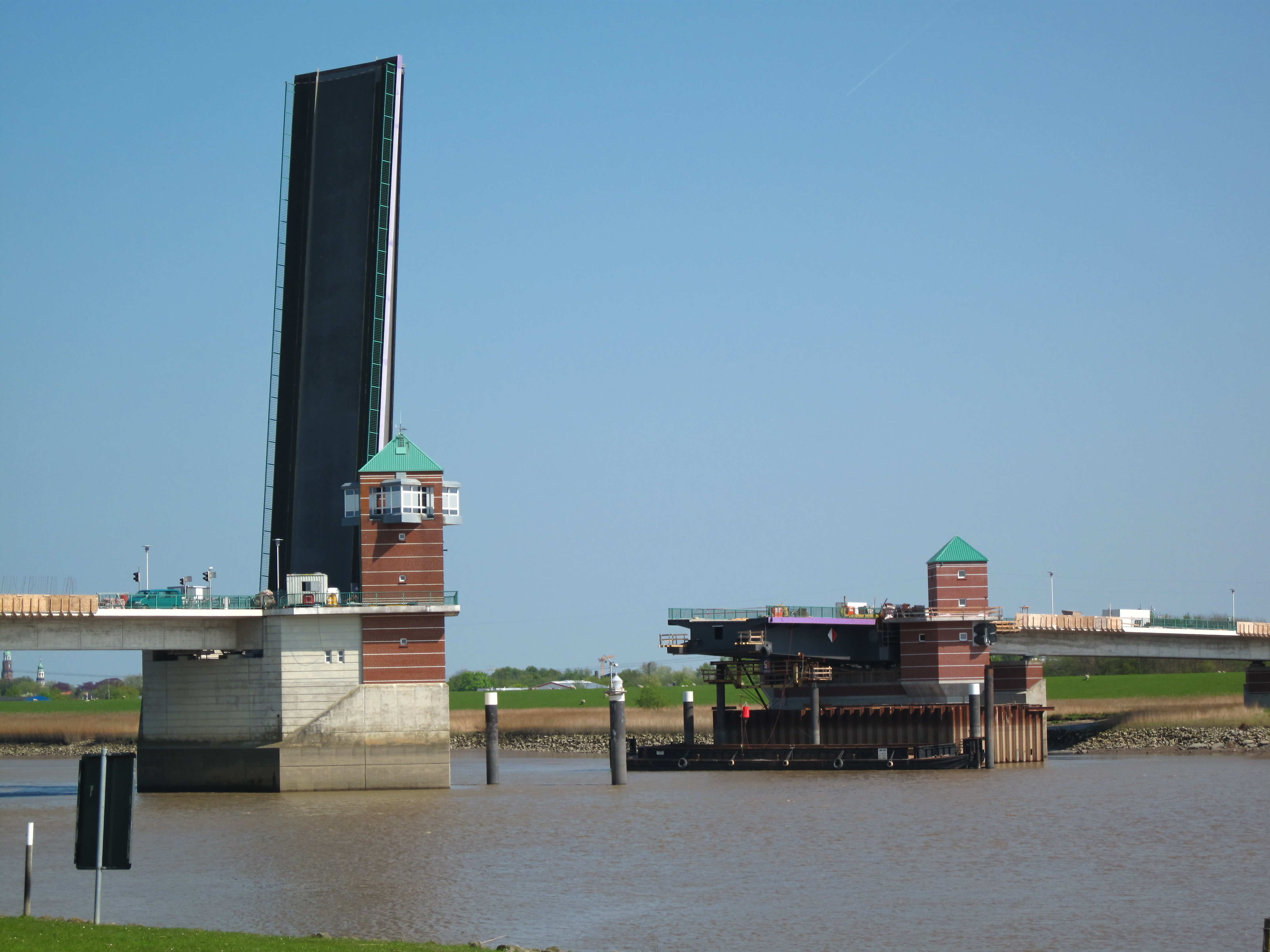 Jann-Berghaus-Brug